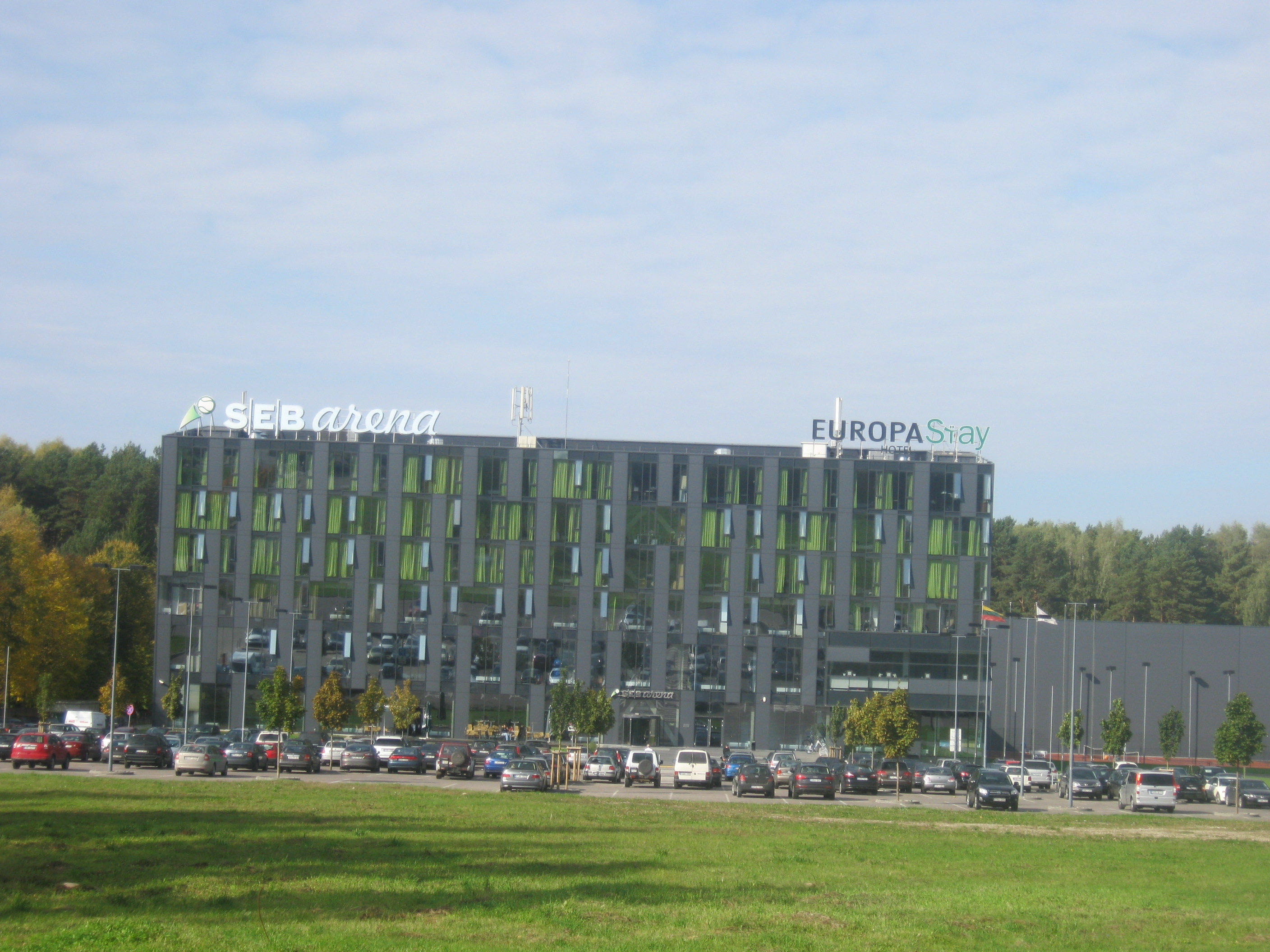 SEB arena